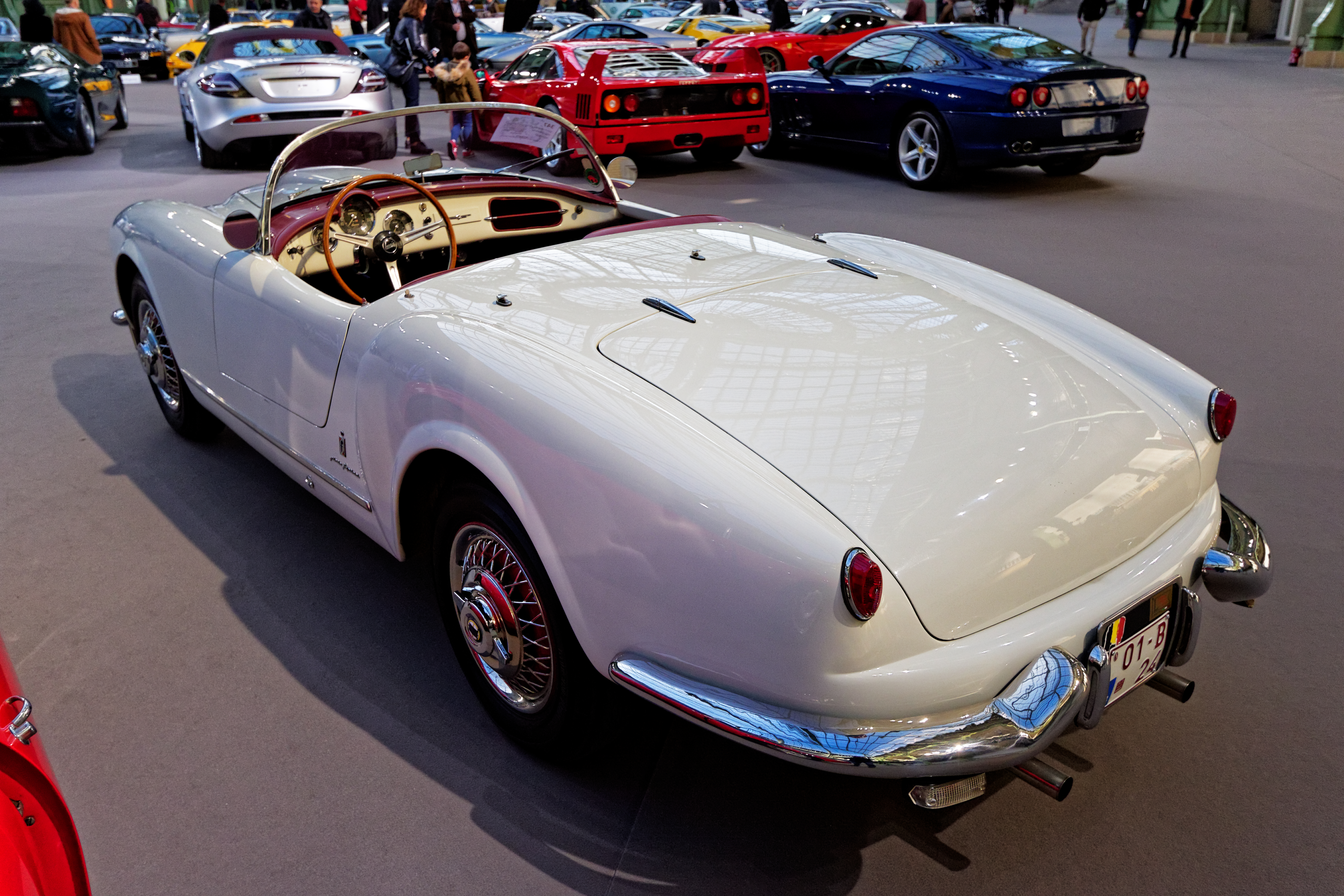 Un des véhicules présenté lors de la vente aux enchères Bonhams 2016 au Grand Palais de Paris.